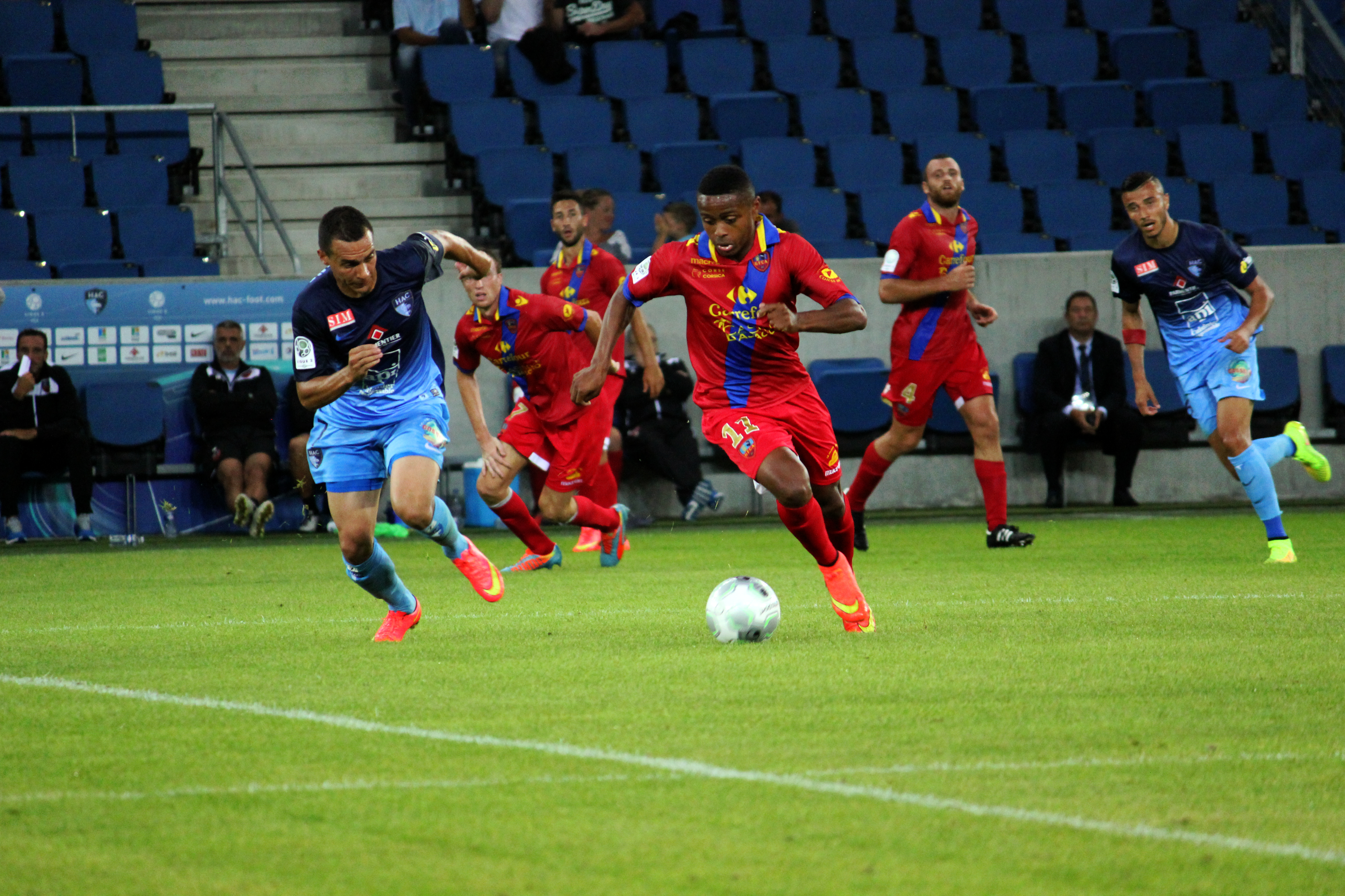 8 août 2014 - Deuxième journée du championnat de Ligue 2 française Le Havre AC - GFC Ajaccio